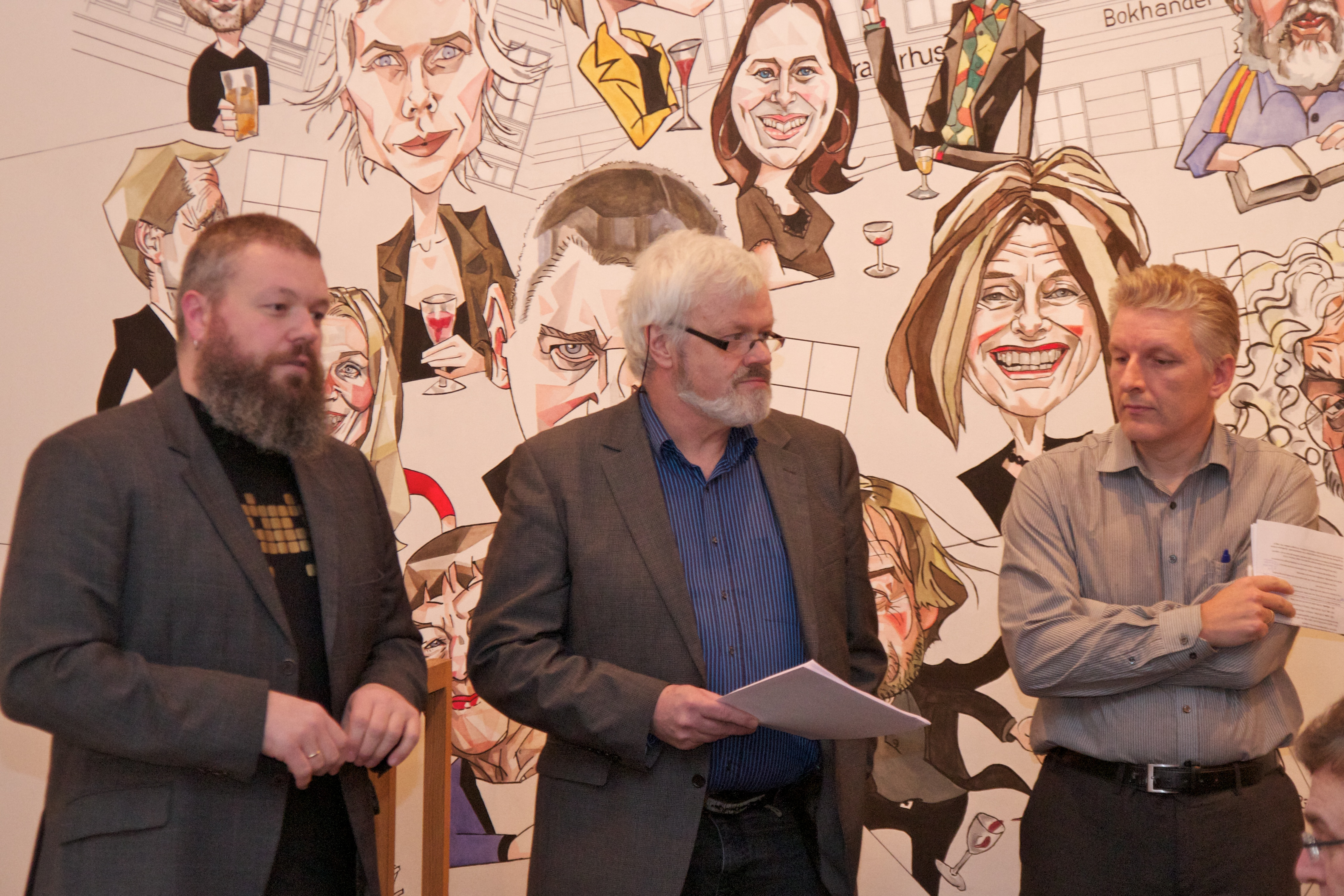 T. Waterhouse, O. Grepstad og E. Bjørtvedt under feiringen av Wikipedias tiårsdag i Oslo.